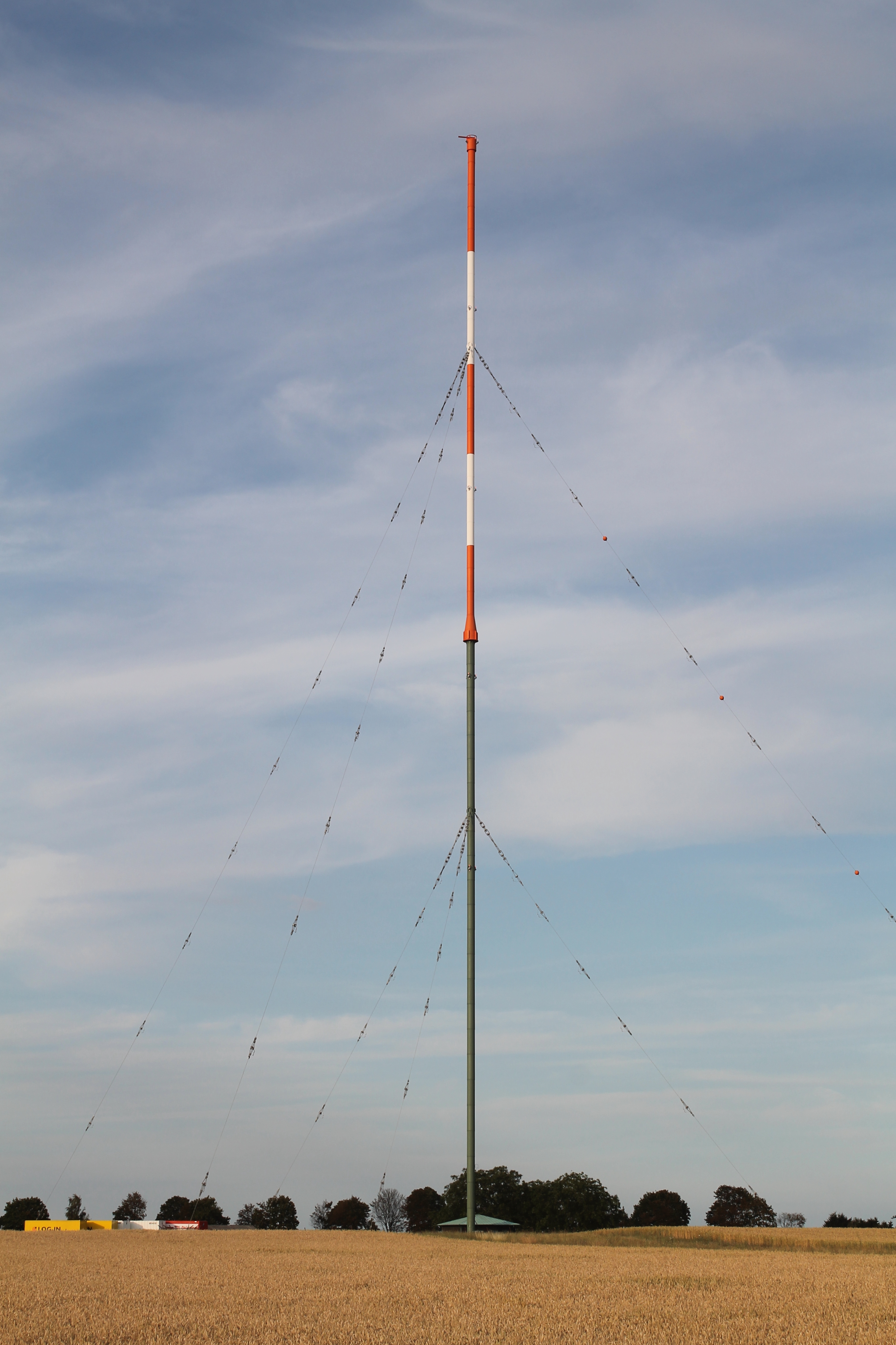 Hauptsendemast des Rheinsenders